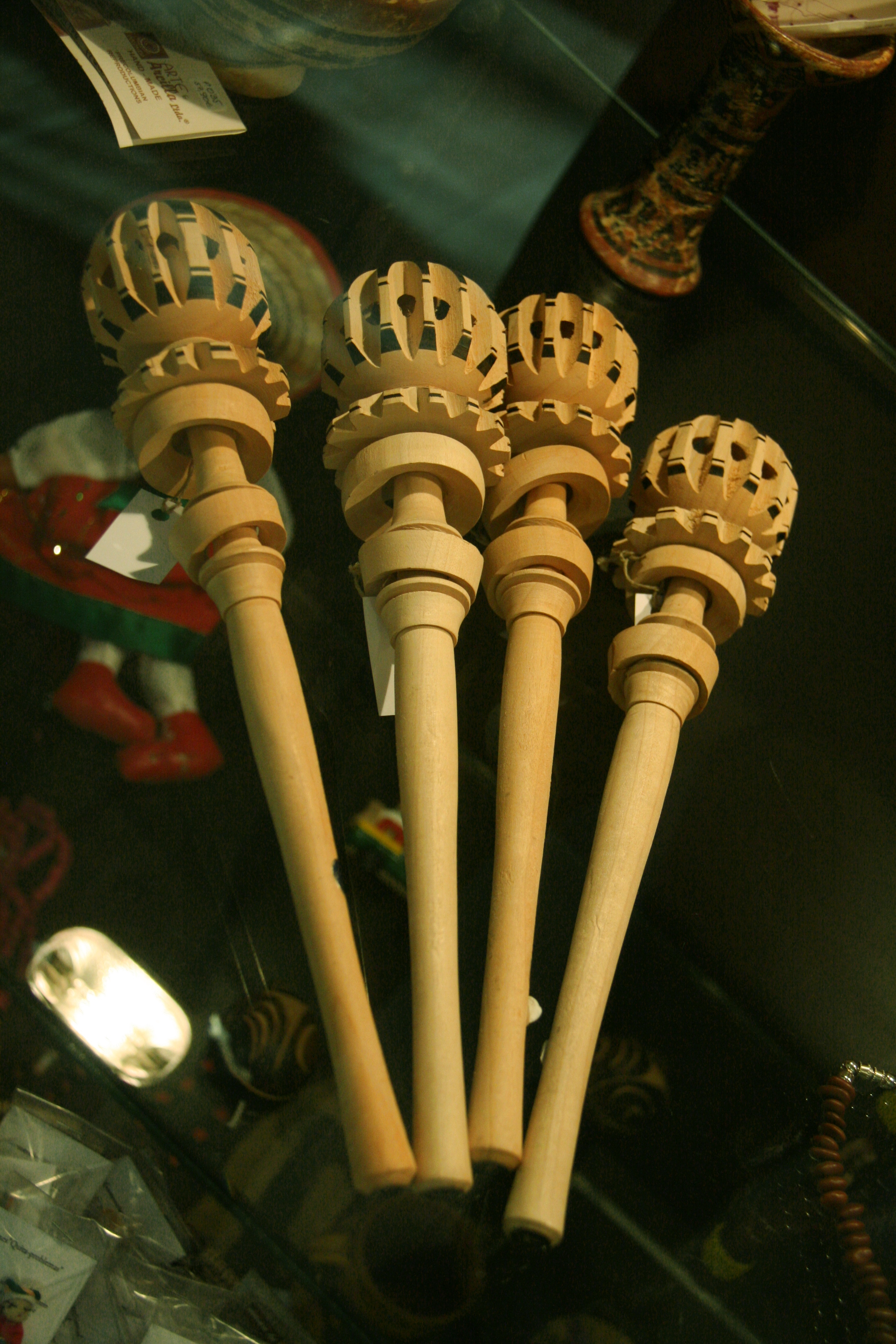 Molinillos de Madera